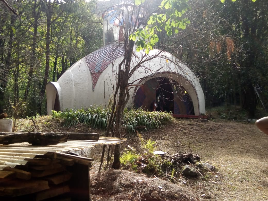 Capilla ecuménica de la comunidad del Arca